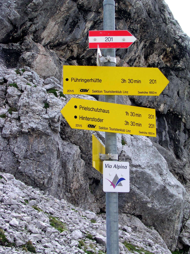 Schild Via Alpina